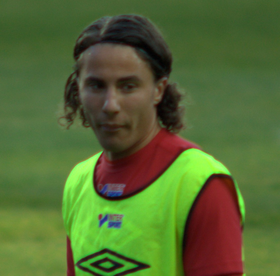 Jonathan Azulay